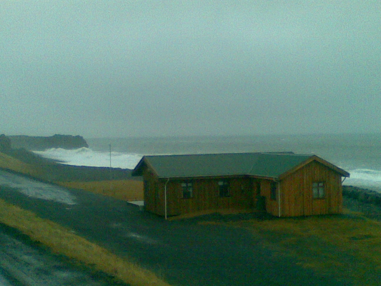 Félagsheimilið Hamarsbúð á Vatnsnesi